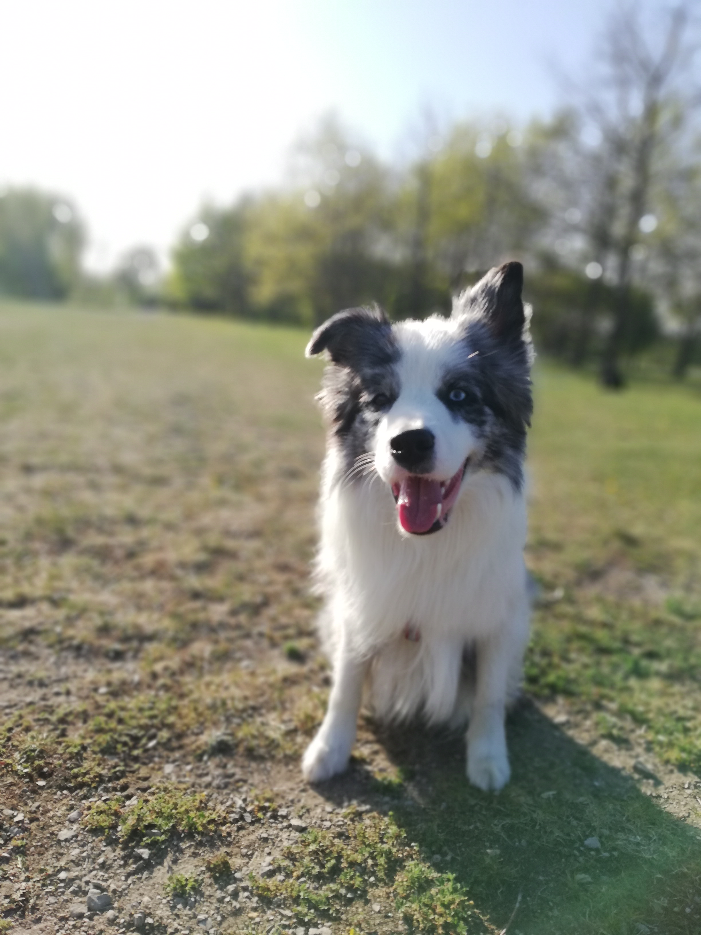 Mėlyno marmuro borderkolis